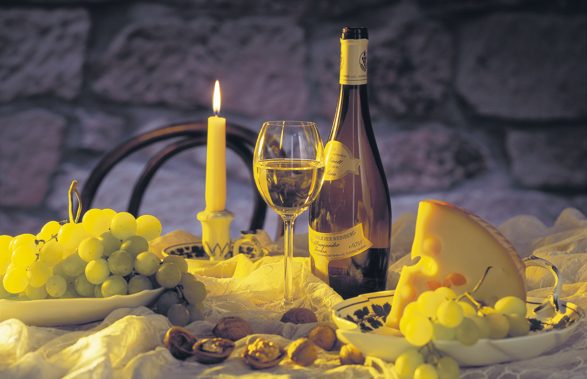 Eine Rarität - Weine aus Sachsen. Rare Wines from Saxony.